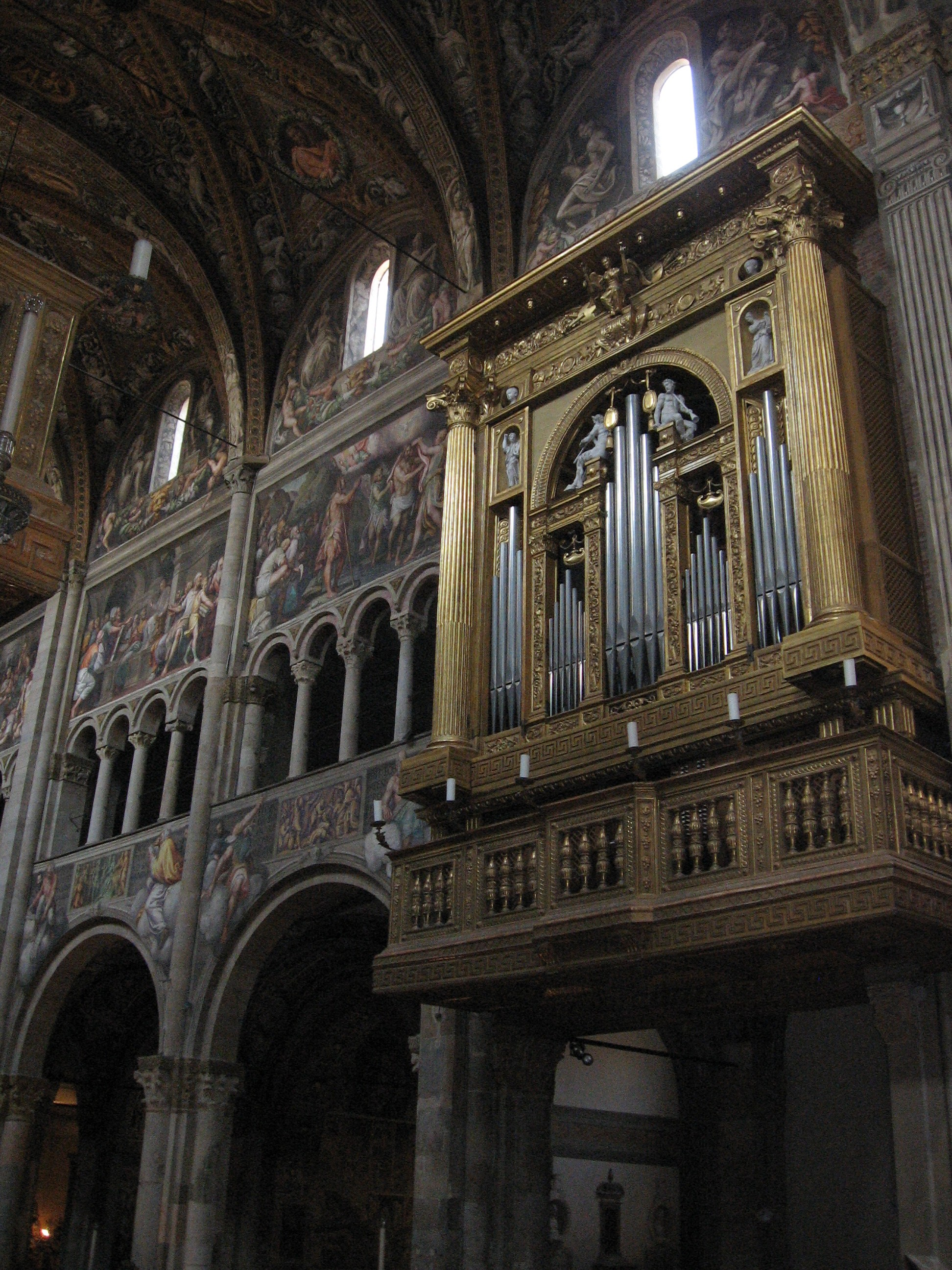 Organo della Cattedrale di Parma